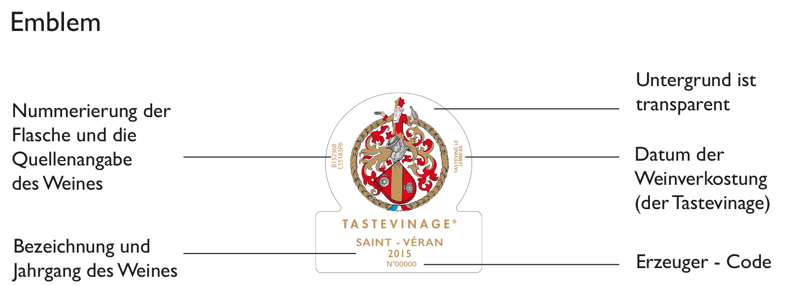 Tastevinage Macaron (1934) allemand